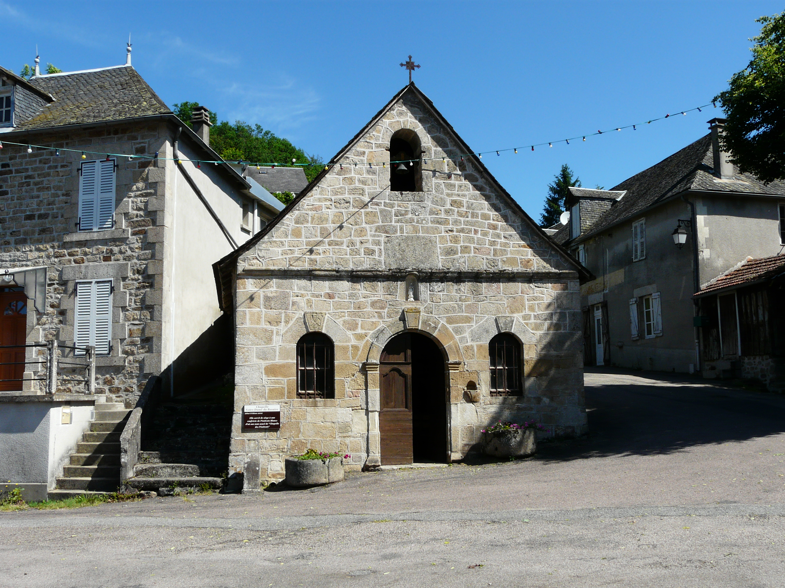 La chapelle Notre-Dame du Rosaire (ou des Pénitents blancs), Gimel-les-Cascades, Corrèze, France